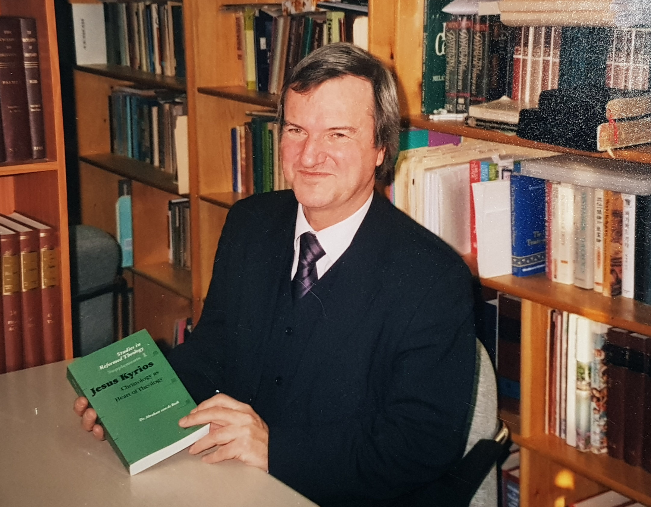 브람 판 더 베크 교수가 자신을 저서를 보여주고 있다. 평택대학교